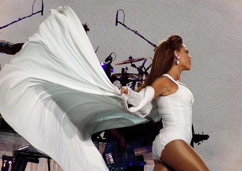 Beyonce durante el I am... Tour en Vancouver Canada